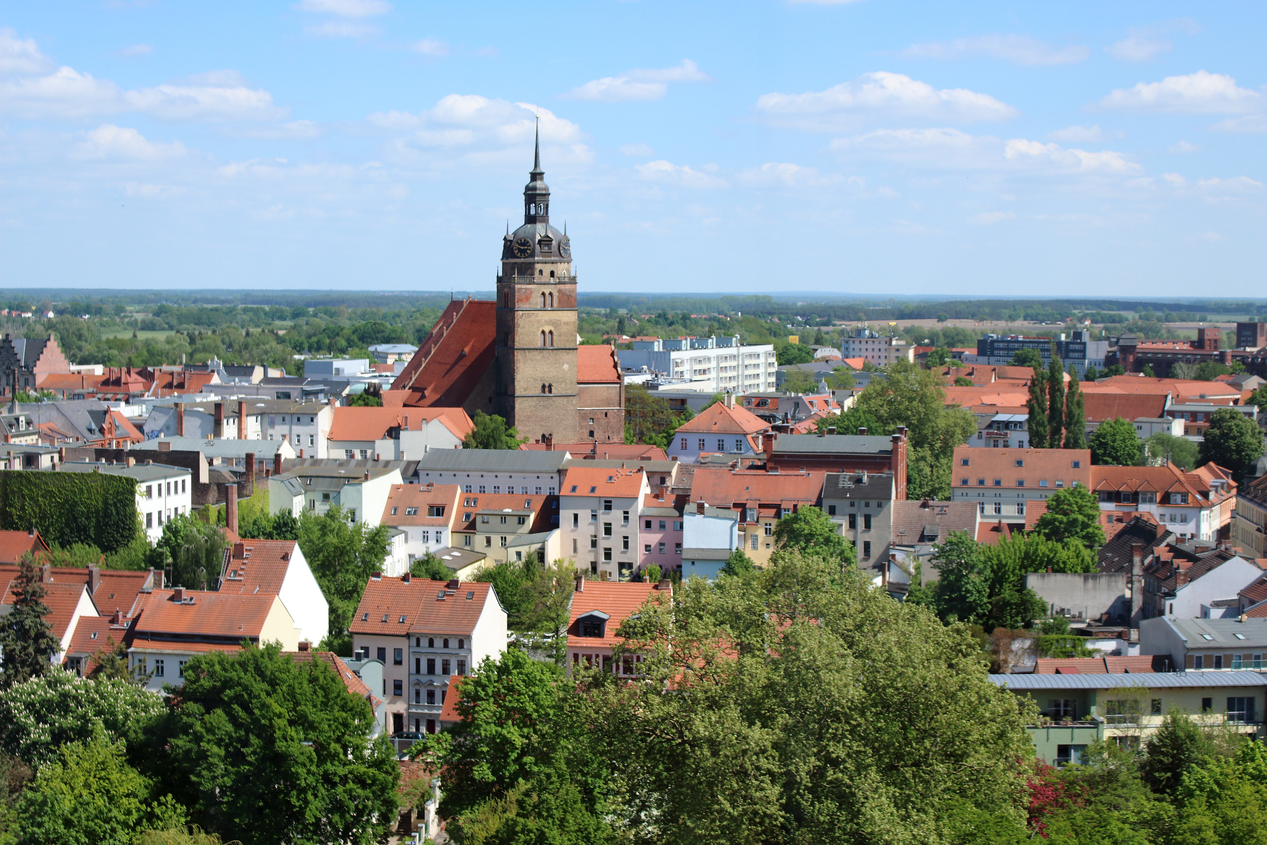 Immobilien in Brandenburg an der Havel vom Skyliner während der BUGA 2015